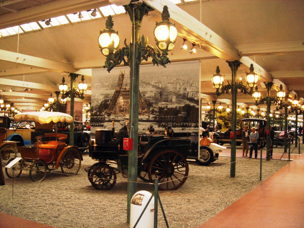 Musée National De L'Automobile. Zentral der Jacquot Dampfwagen von 1878 und links ein Benz Velo von 1896.